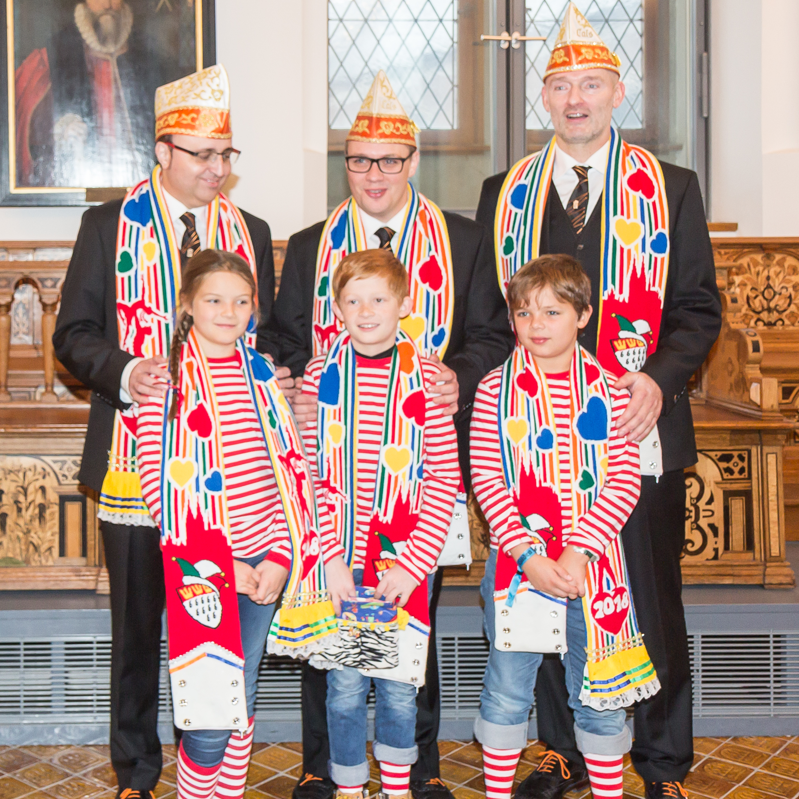 Vertragsunterzeichnung Sessionsvertrag und Empfang im Senatssaal des Historischen Rathauses von Köln zur Session 2017/18 Foto: Prinz Michael II. (Mitte) mit Bauer Christoph (r.) und Jungfrau Emma (l.). Davor: Das Kinder-Dreigestirn Balthazar, Kai und Marie